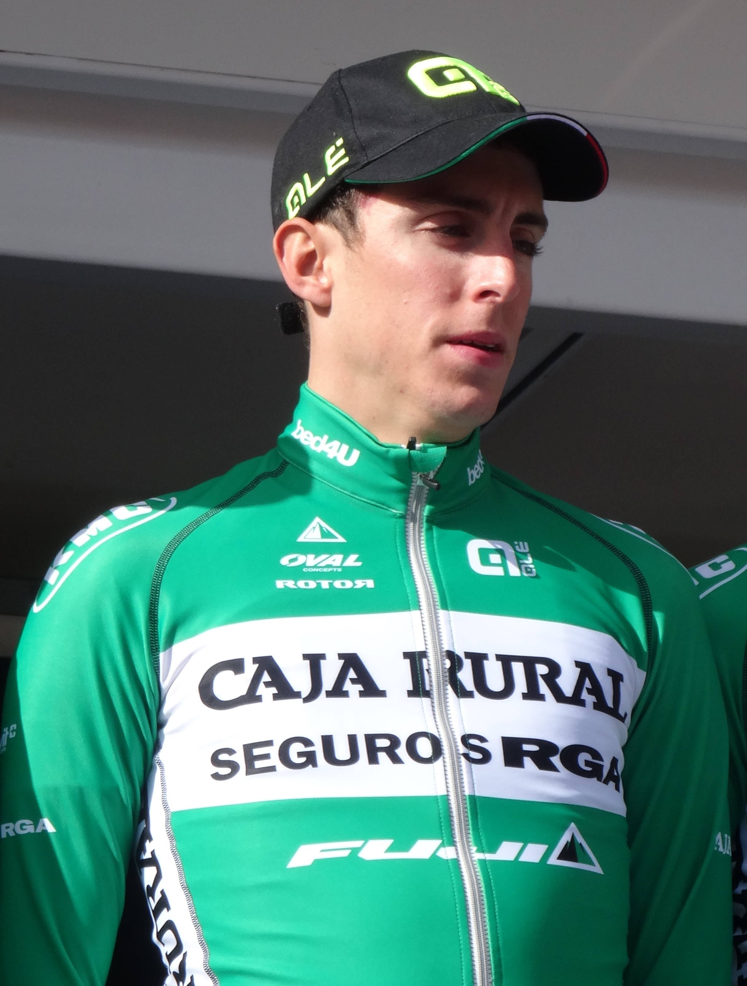 Reportage réalisé le mercredi 4 mars à l'occasion du départ du Samyn des Dames 2015 et du Samyn 2015 à Quaregnon, Belgique.